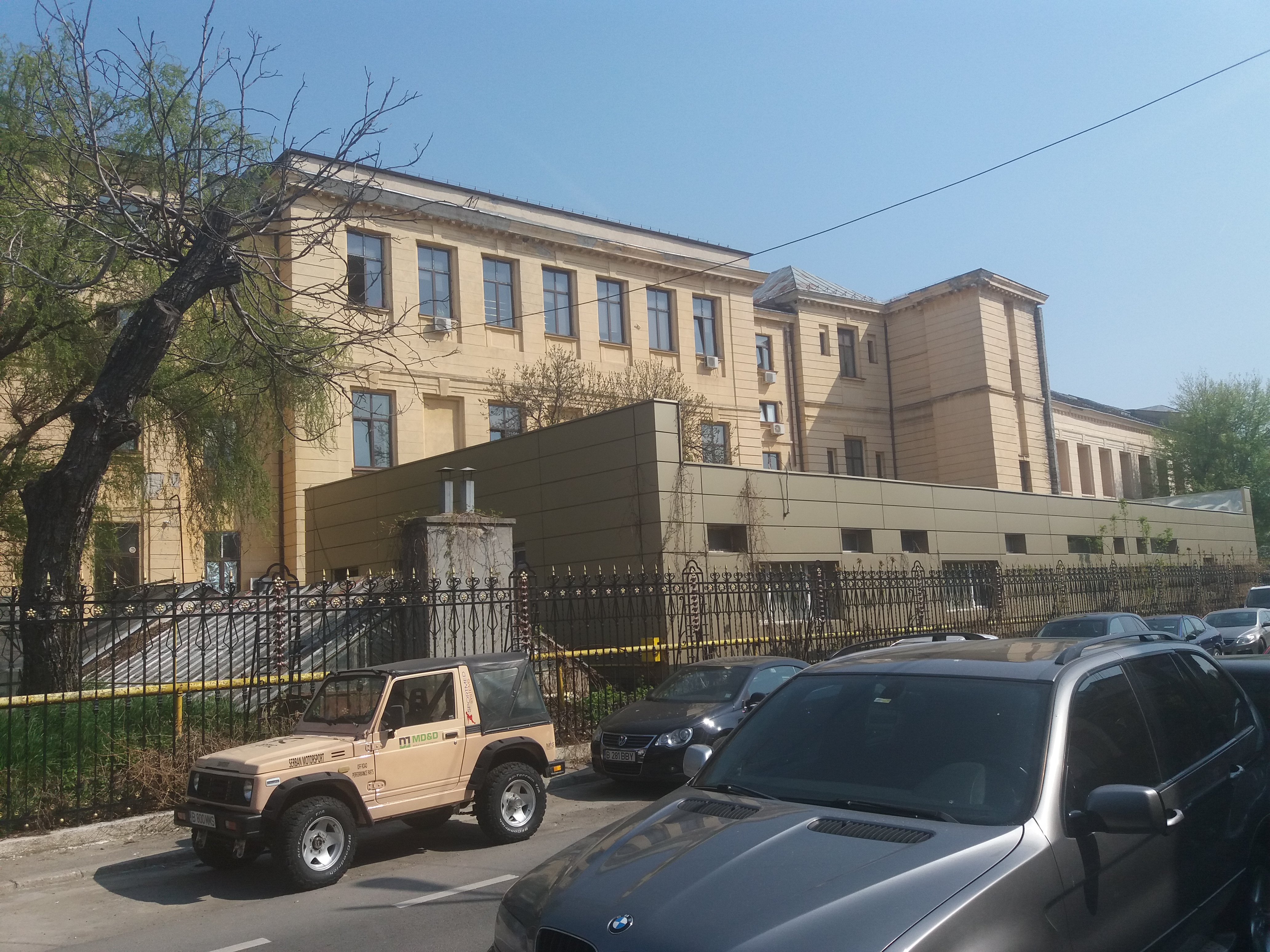 Universitatea de Medicină și Farmacie Carol Davila din București Facultatea de Medicină